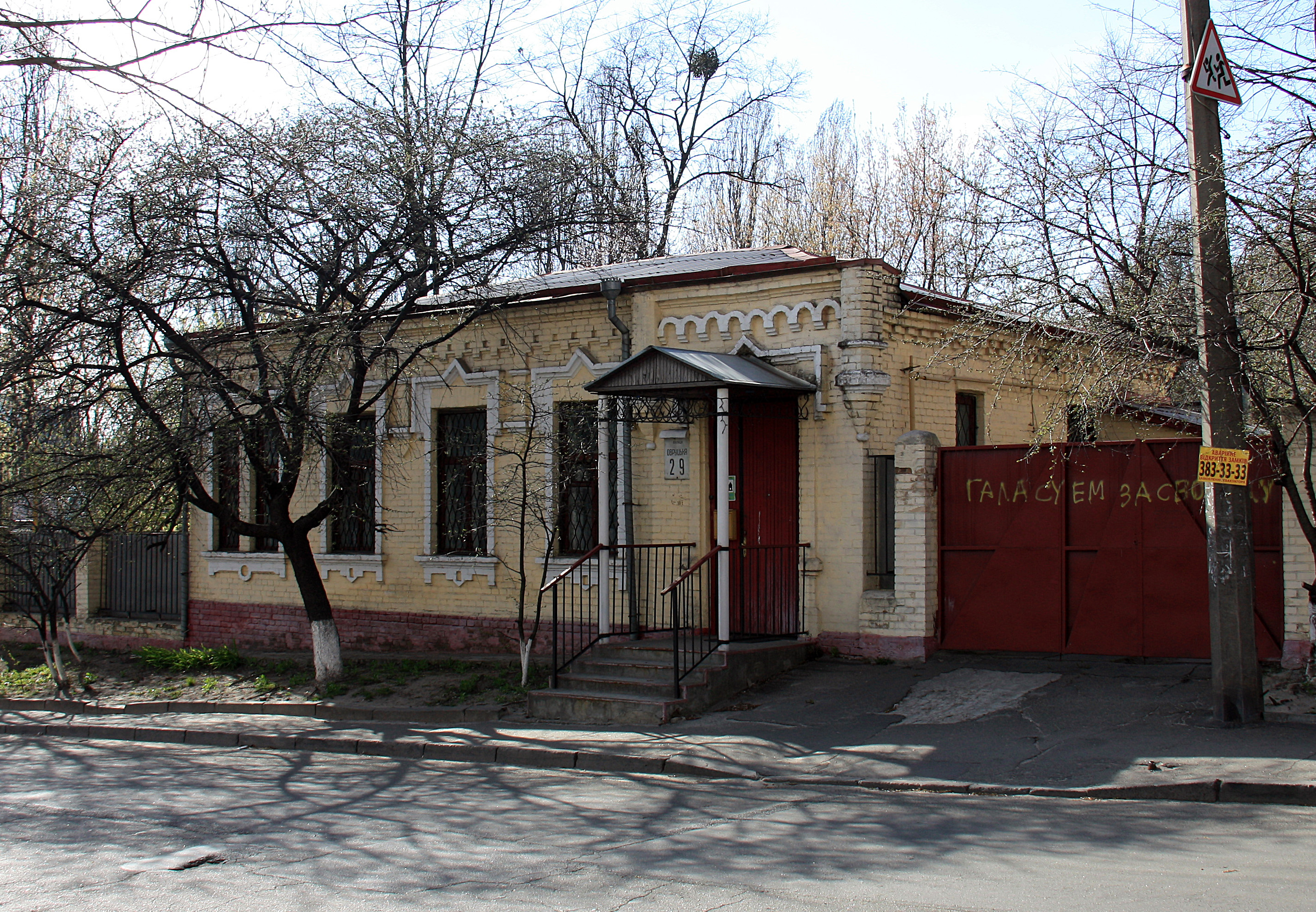 Київ, вул. Овруцька, 29